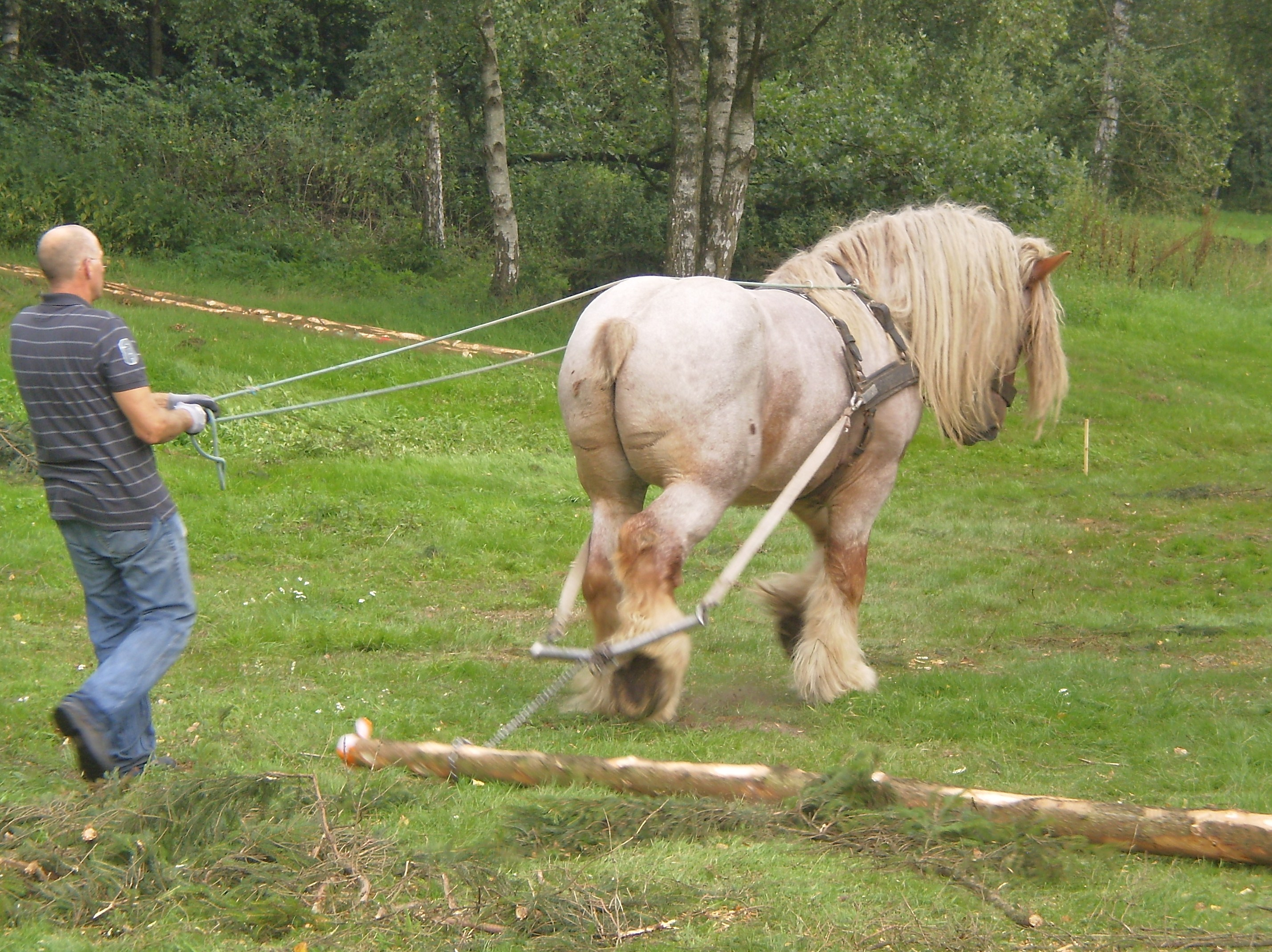 Houthakkersfeest Lage Vuursche in 2010 Belgisch bospaard